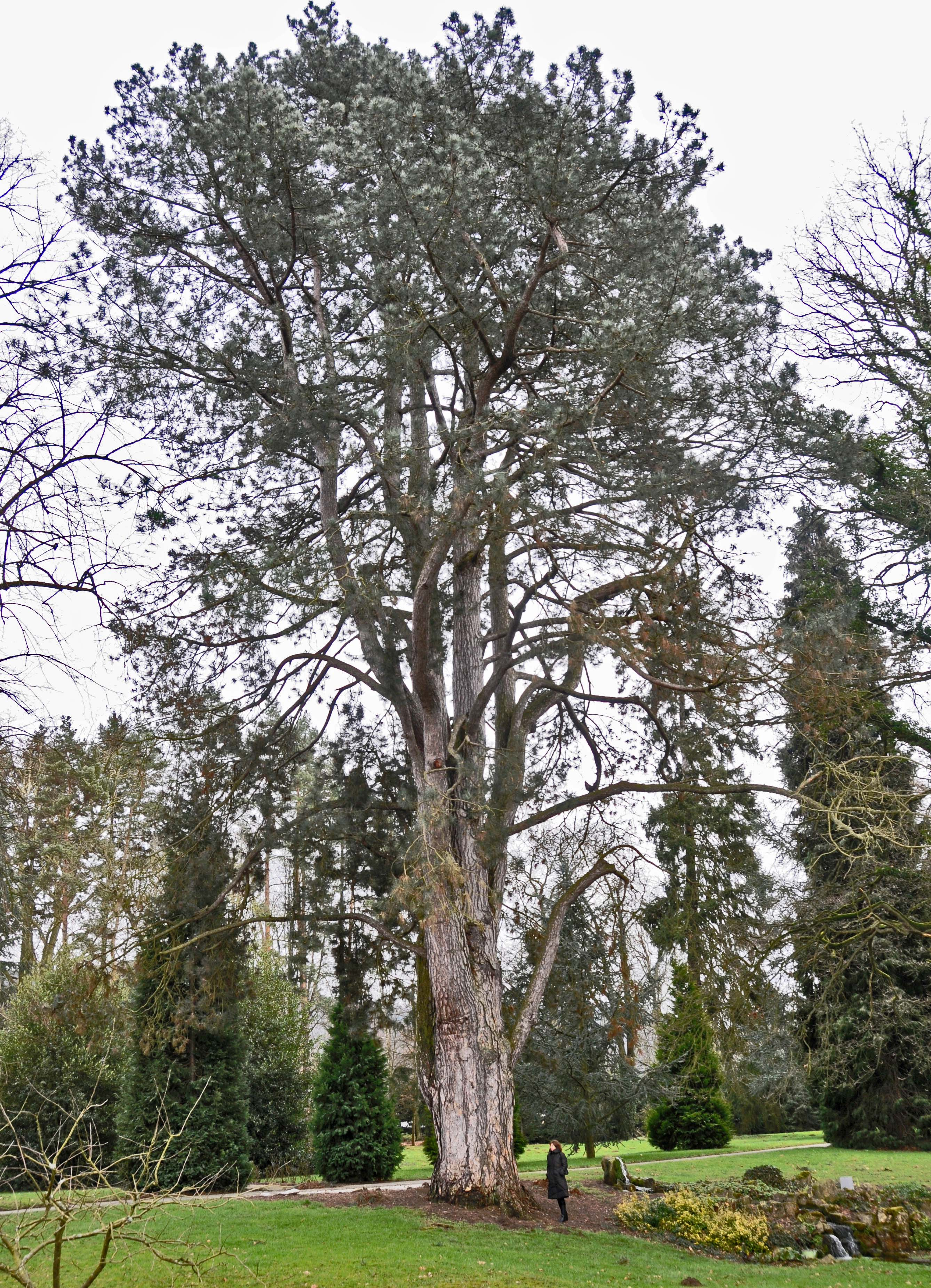 Schwaarzkifer zu Heeschdref.